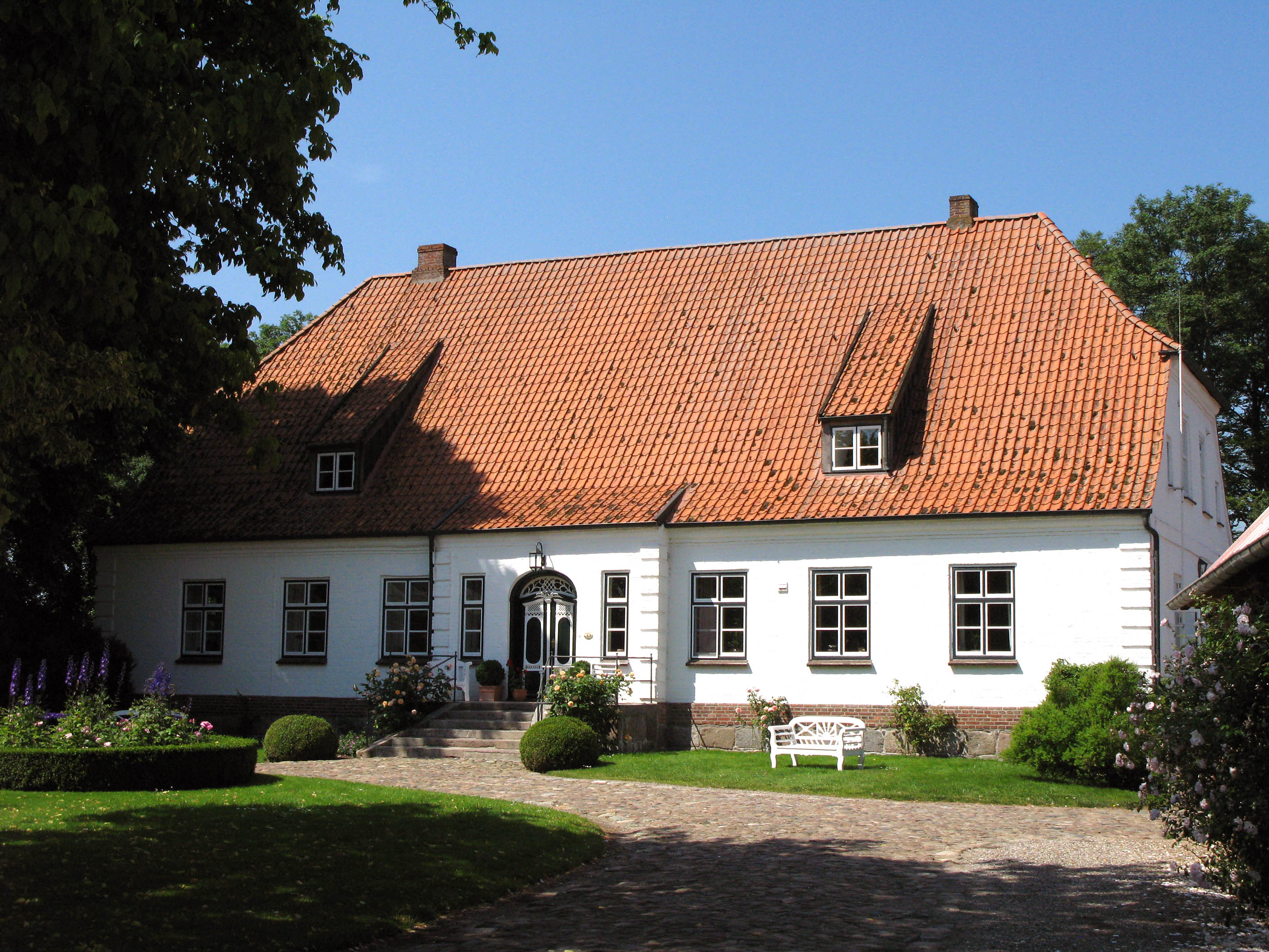 Brunsholmhof, Herrenhaus